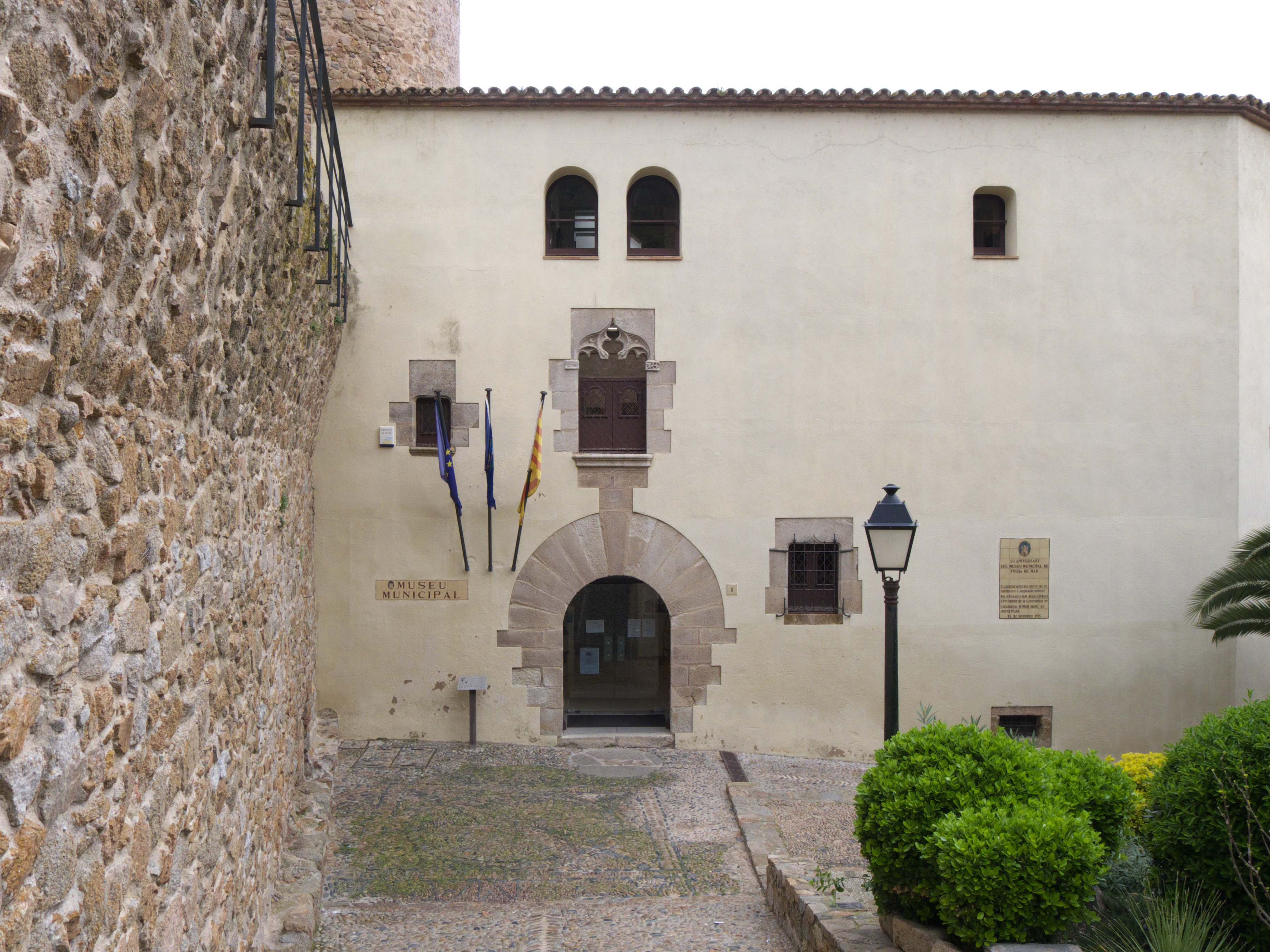 El abad del Monasterio de Santa María de Ripoll designaba al gobernador de Tossa.